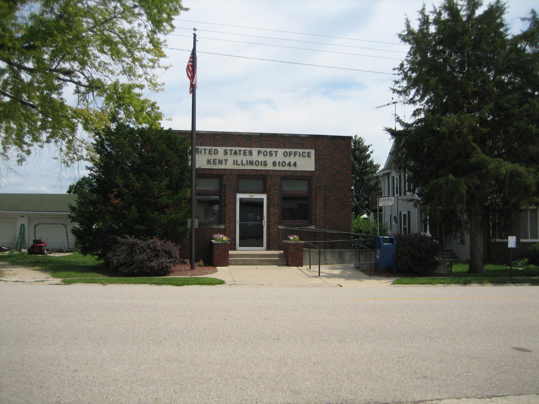 U.S. Post Office, Kent, Illinois, USA.